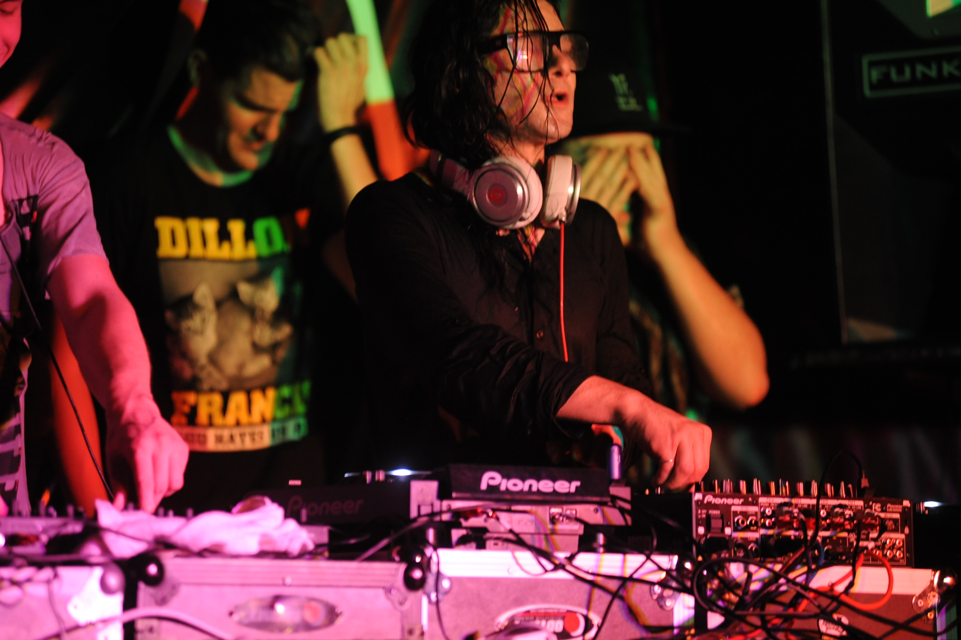 Skrillex